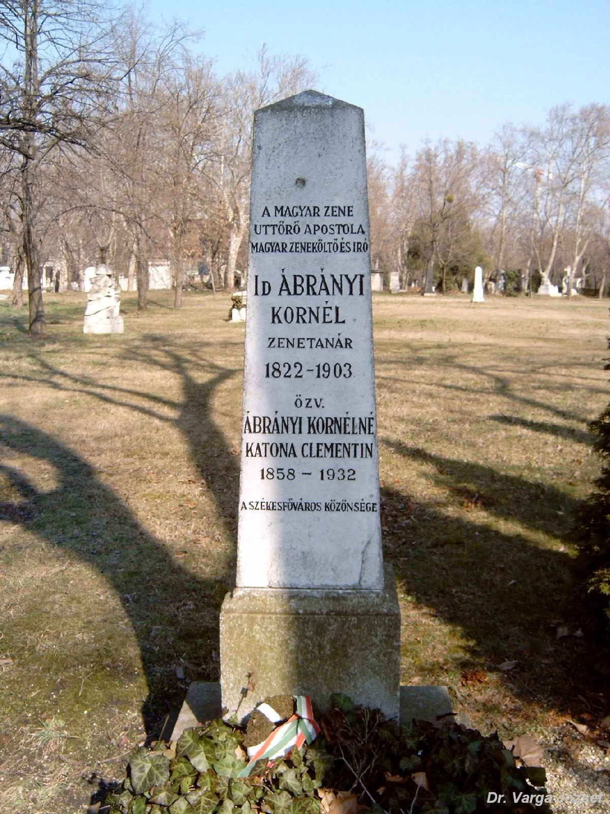 La tombe de Kornél Ábrányi á Budapest dans la cimeterie de la rue Kerepesi.